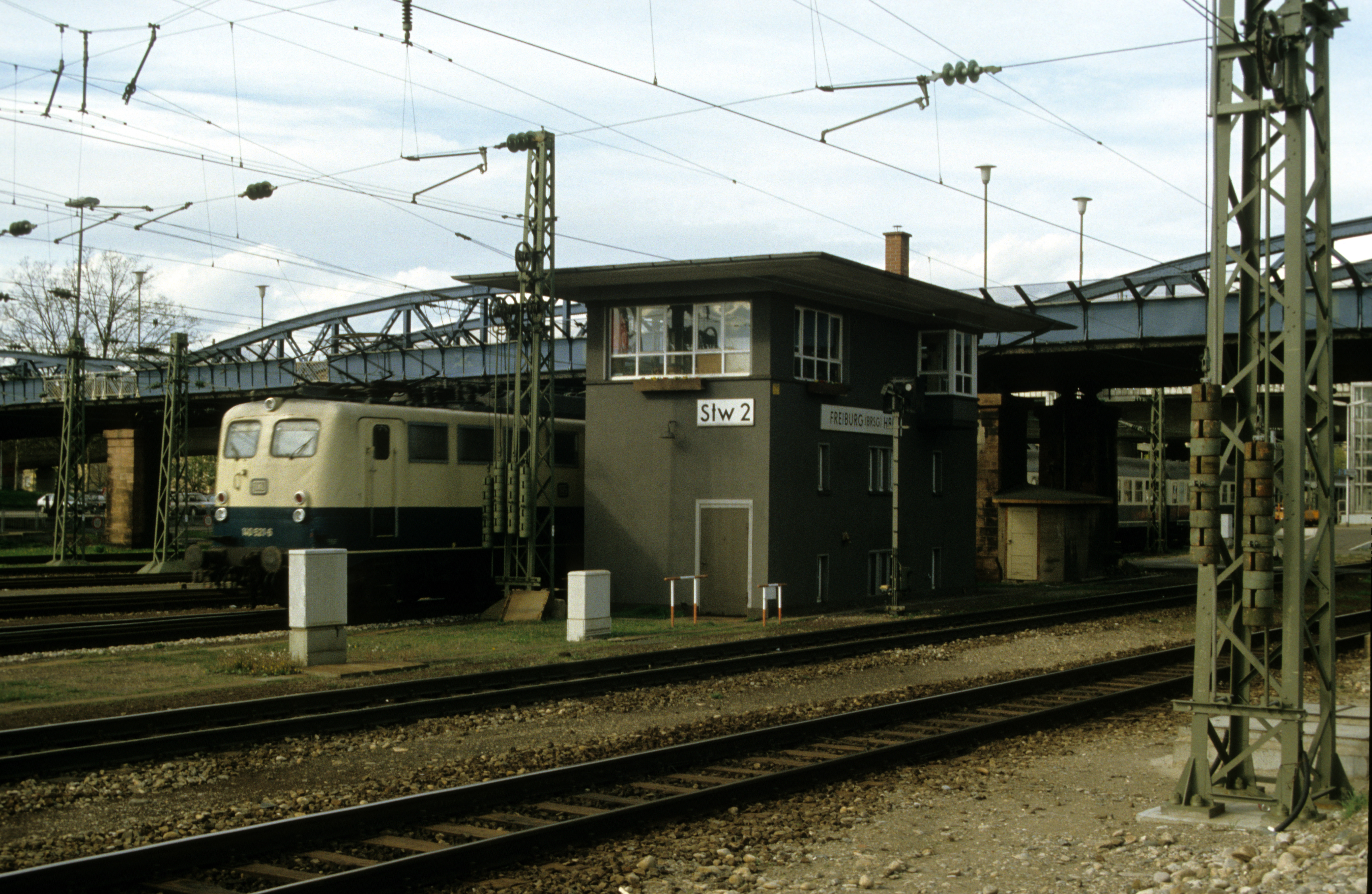 Ehemaliges Stellwerk 2 (elektromechanisches Stellwerk) an der Stühlingerbrücke, jetzt Wiwilibrücke, mit Ausfahrt einer 140er in Richtung Basel - HBF Stv 2